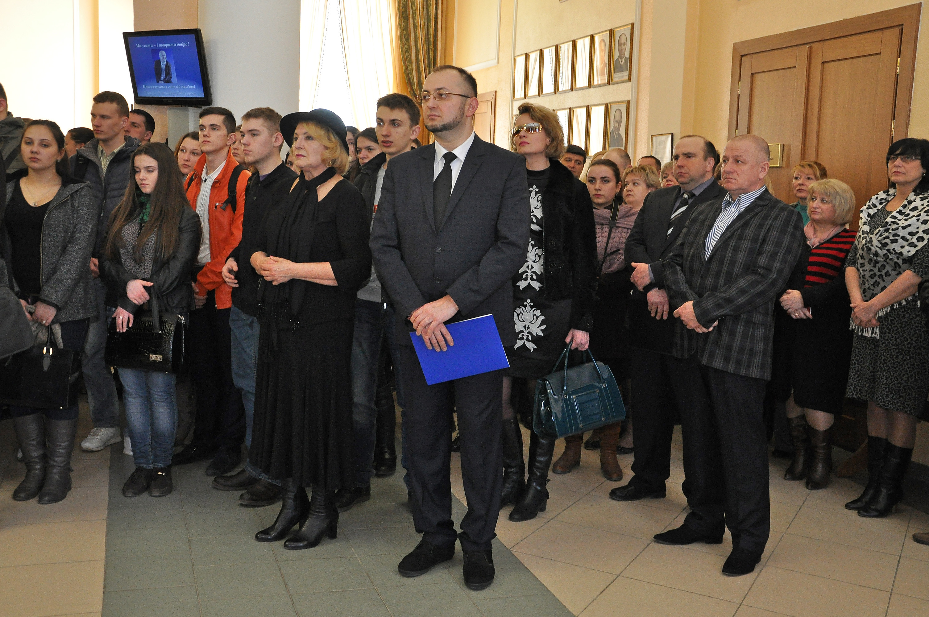 Відкриття Музею Леоніда Якимовича Ковальчука в Тернопільському державному медичному університеті імені І. Я. Горбачевського. На передньому плані Олександр Ковальчук.